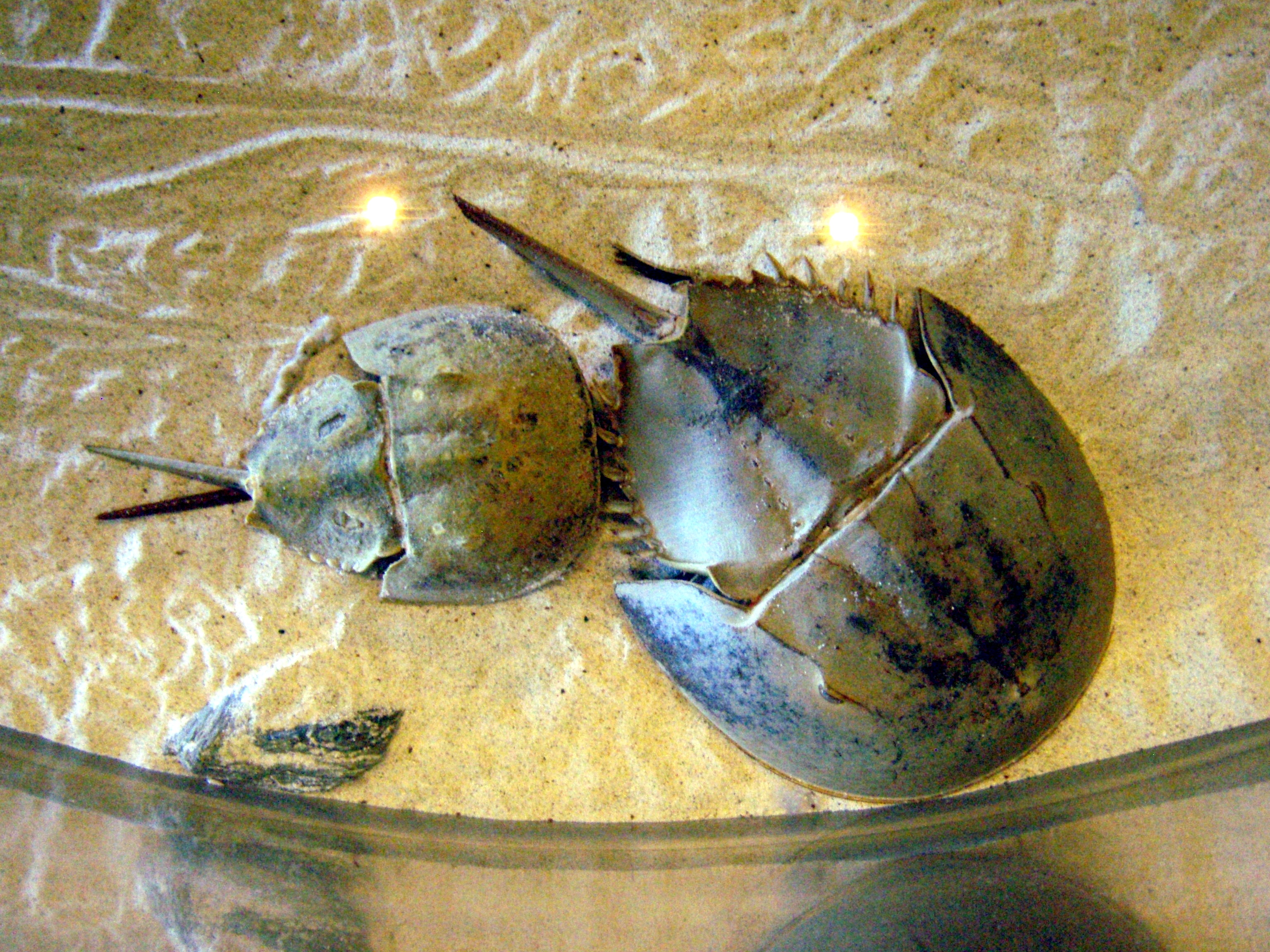 上部から見たカブトガニ